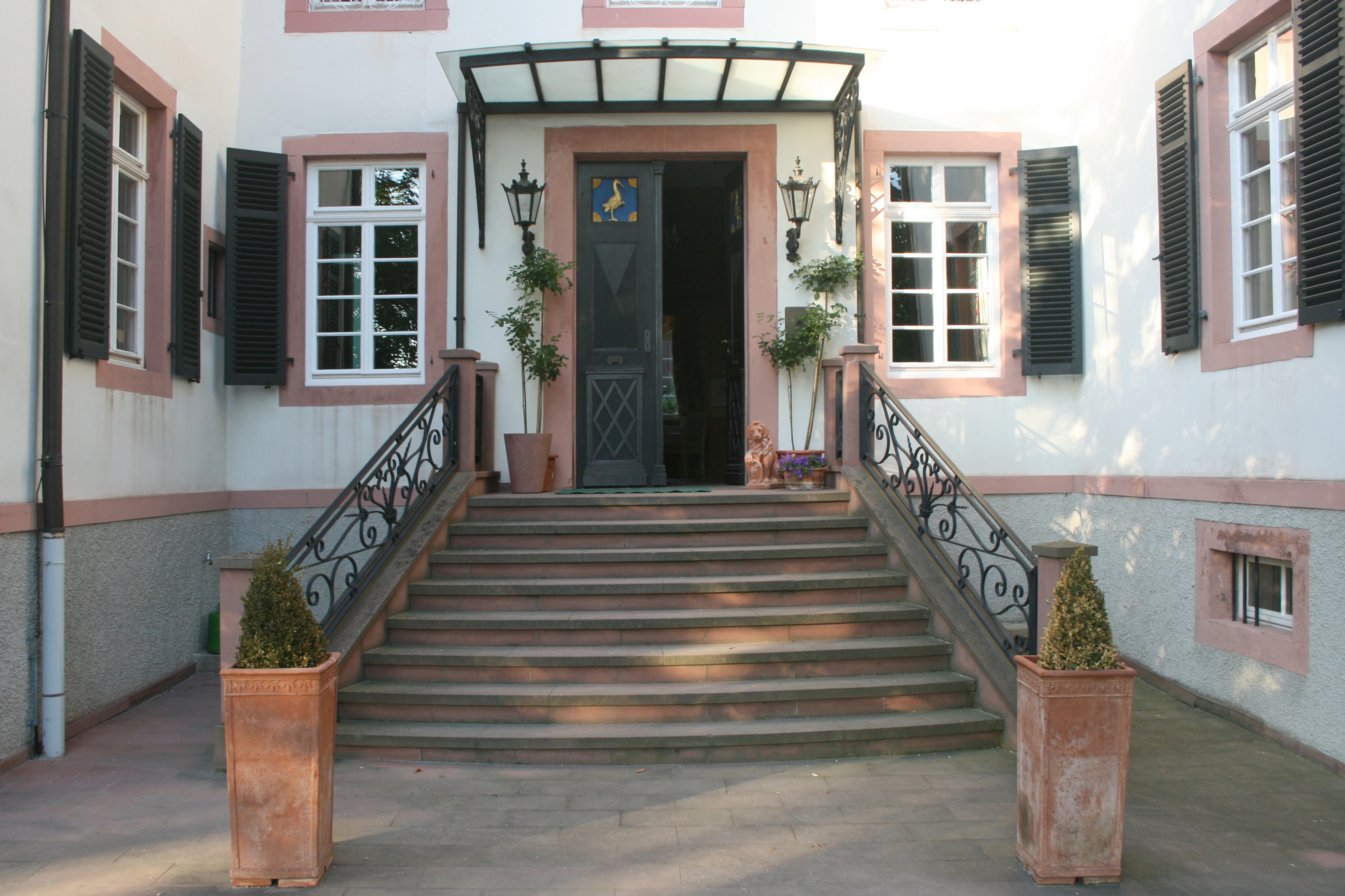 Ansicht des Löw’schen Schloss (Herrenhaus) in Steinfurth, Stadt Bad Nauheim, Wetteraukreis in Hessen, Portal an der Hofseite.